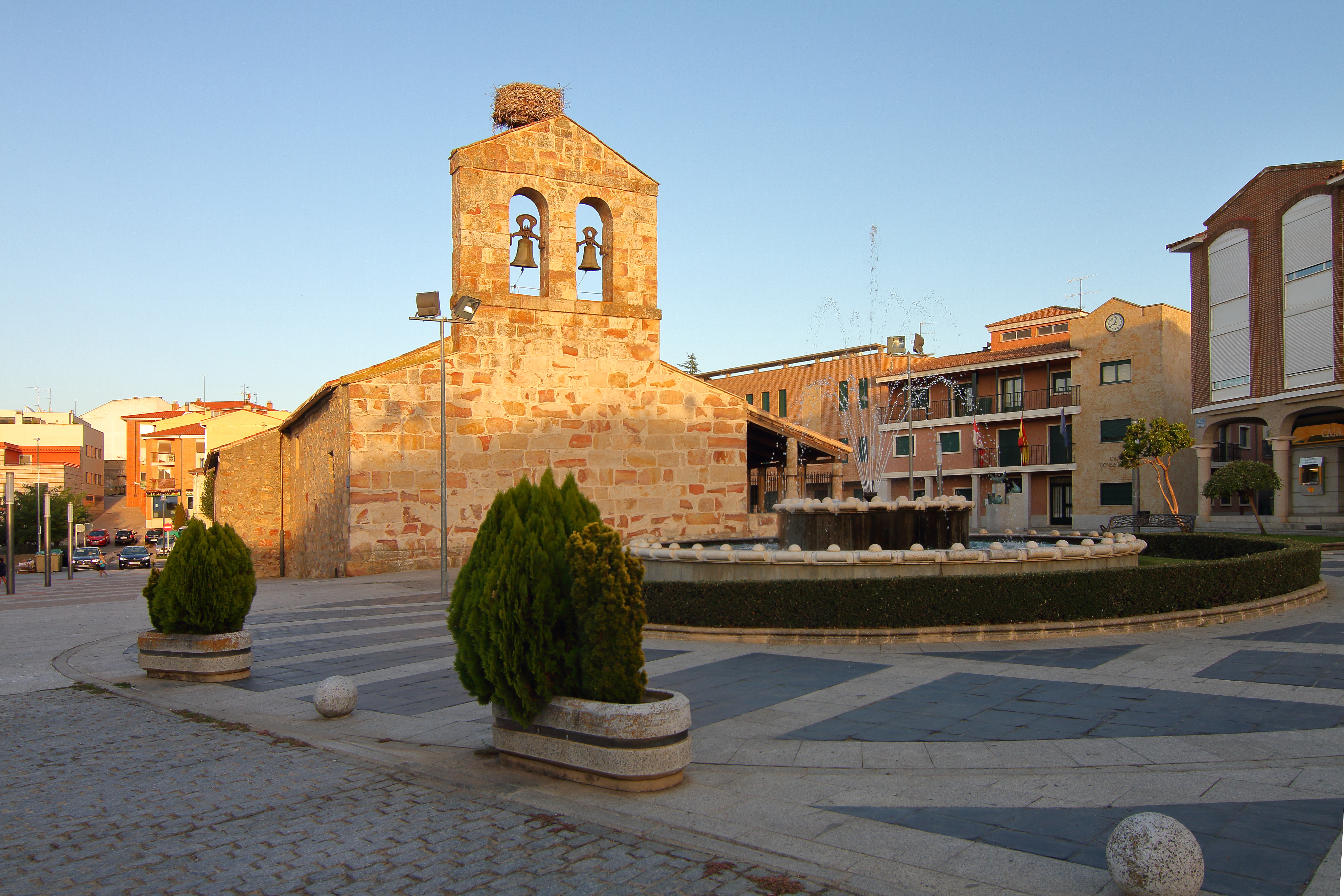 Carbajosa de la Sagrada, plaza de la Constitución, 2